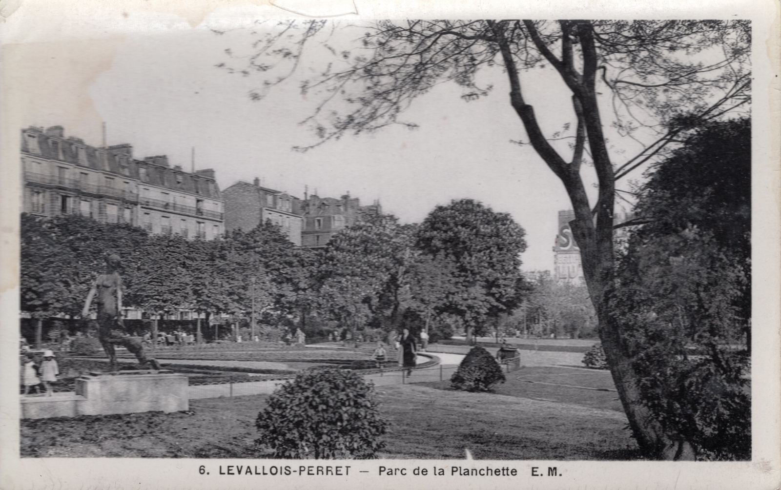 Levallois-Perret.Parc de la Planchette